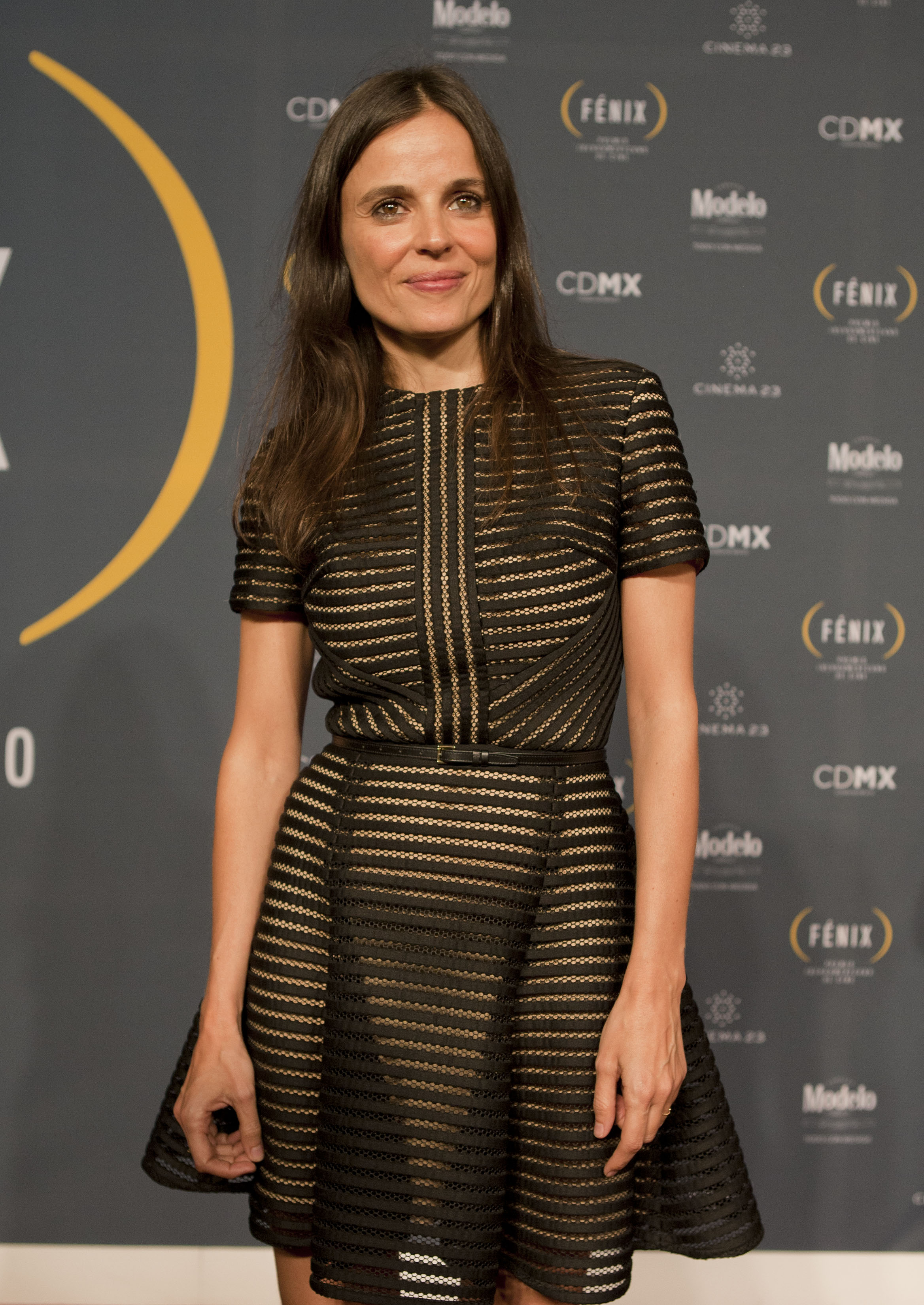 Jueves, 30 de Octubre 2014. Primera emision de la entrega del Fenix, Premio iberoamericano de Cine, realizado en el Teatro de la Ciudad Esperanza Iris, en el participaron artistas de talla internacional como Viggo Mortensen, Gael Garcia Bernal, Elena Anaya, Irene Azuela, Barbara Mori, Ana de la reguera, Daniel Jimenez Cacho, Maribel Verdu, Mia Maestro, y el Jefe de Gobierno Miguel Angel Mancera entre otros.Foto: Antonio Nava / Secretaria de Cultura